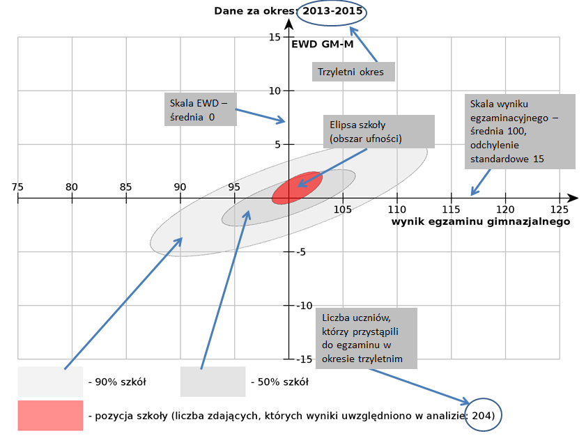 Podstawowe parametry trzyletniego wykresu EWD